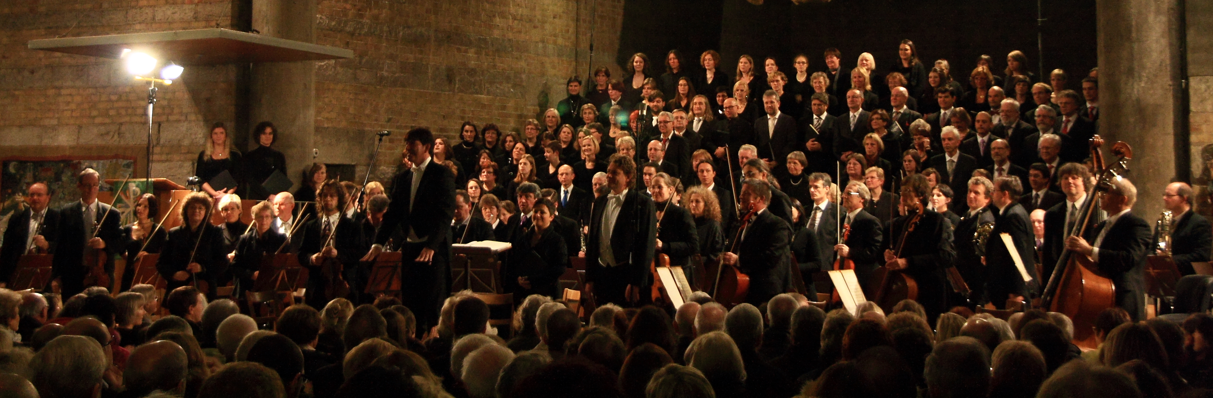 Aufführung des deutschen Requiems in der Kirche Johanniskirche.